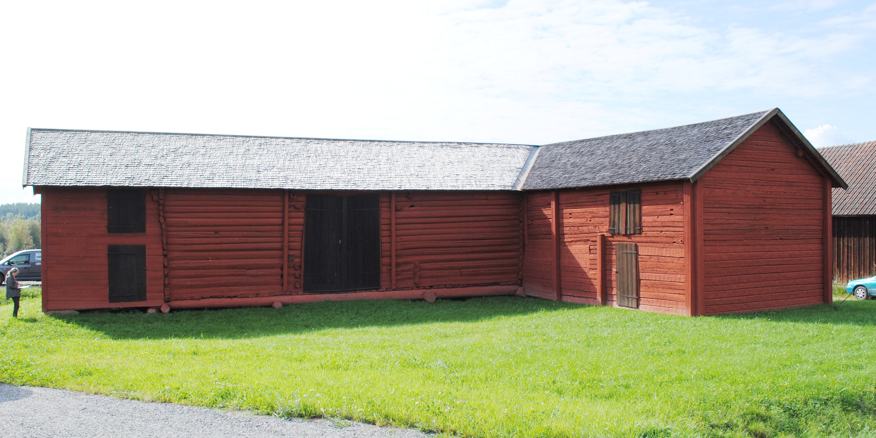 Parlogen i Nyhyttan delvis från efter 1472, byggnadsminne